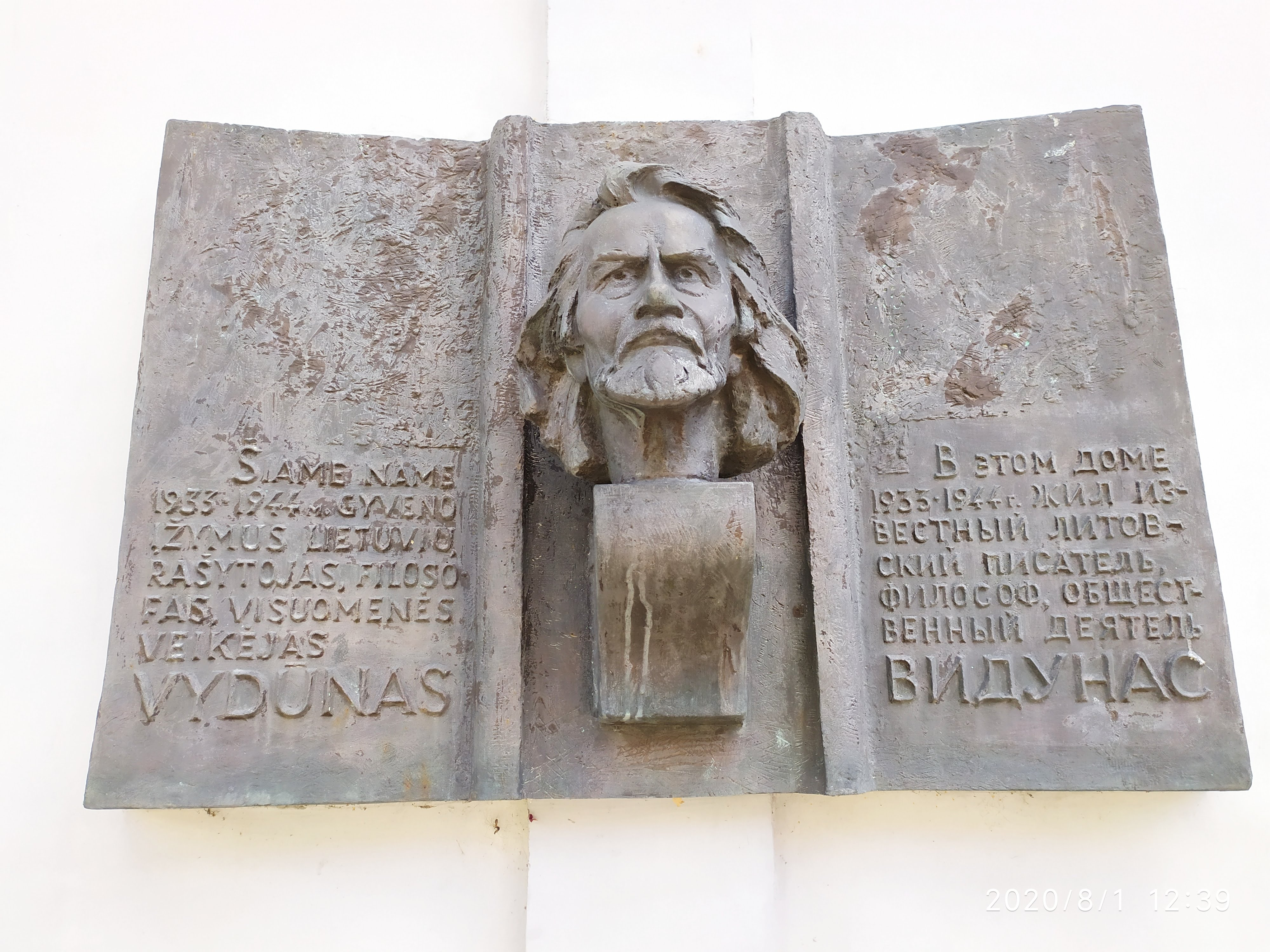 Памятная доска Видунаса в Советске